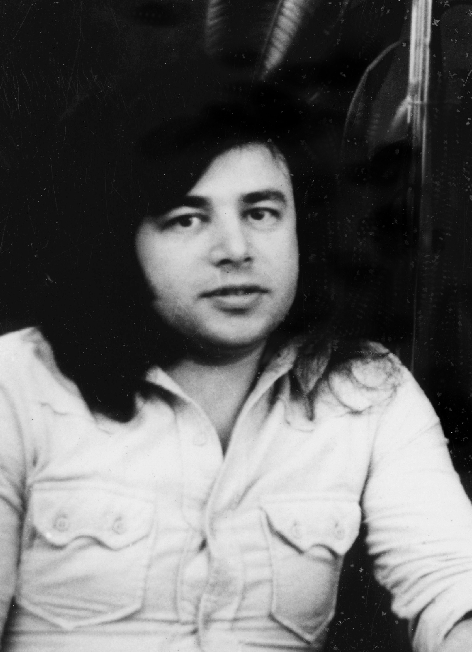 Somló Tamás énekes, basszusgitáros, szaxofonos, dalszerző, artista és jogász. Legismertebb a Locomotiv GT énekeseként, s több sikert aratott dal szerzőjeként.